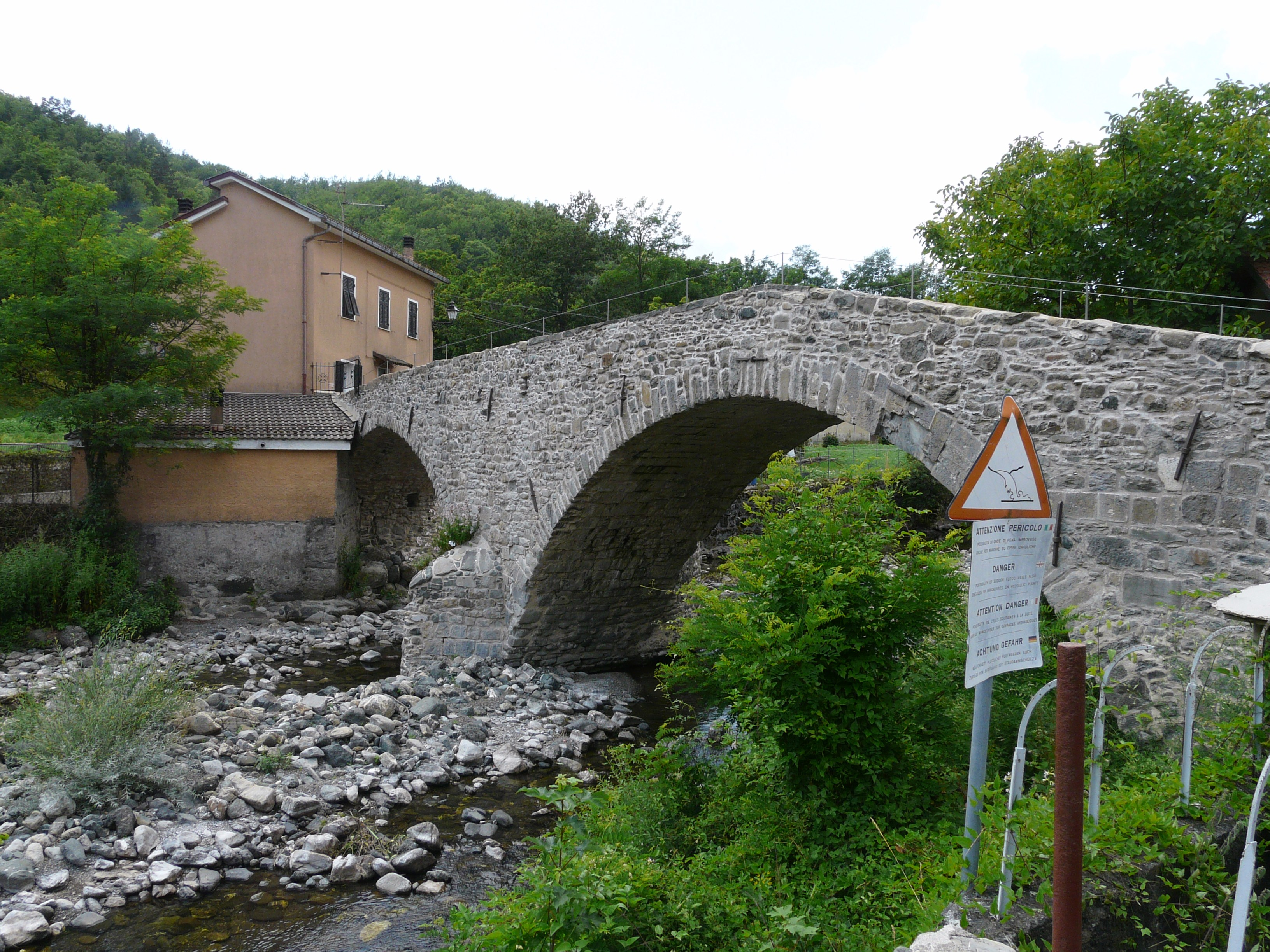 Il ponte dei Priori, Santa Maria del Taro, Tornolo, Emilia-Romagna, Italia